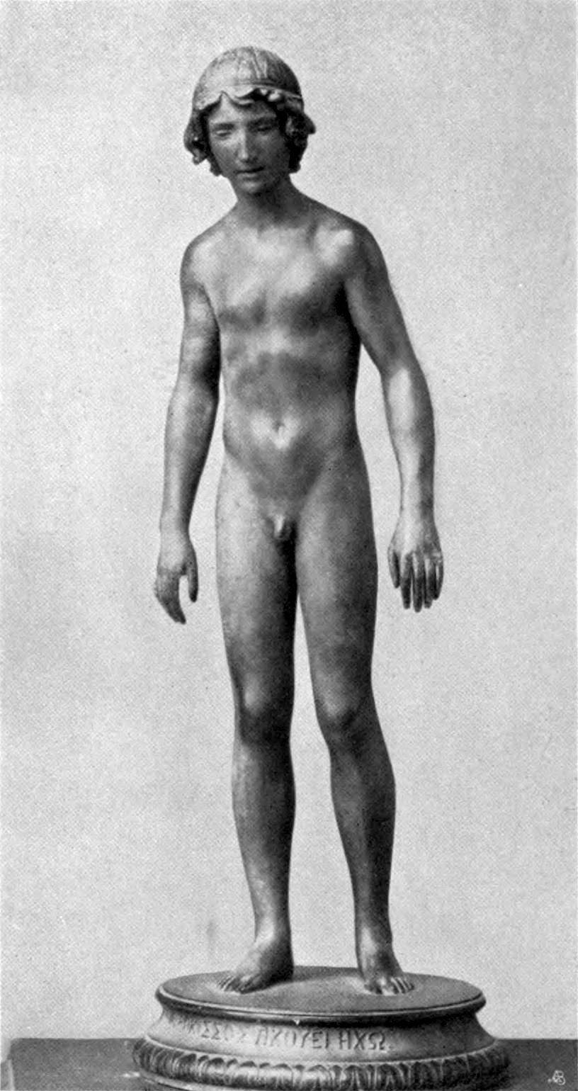 Narcisse